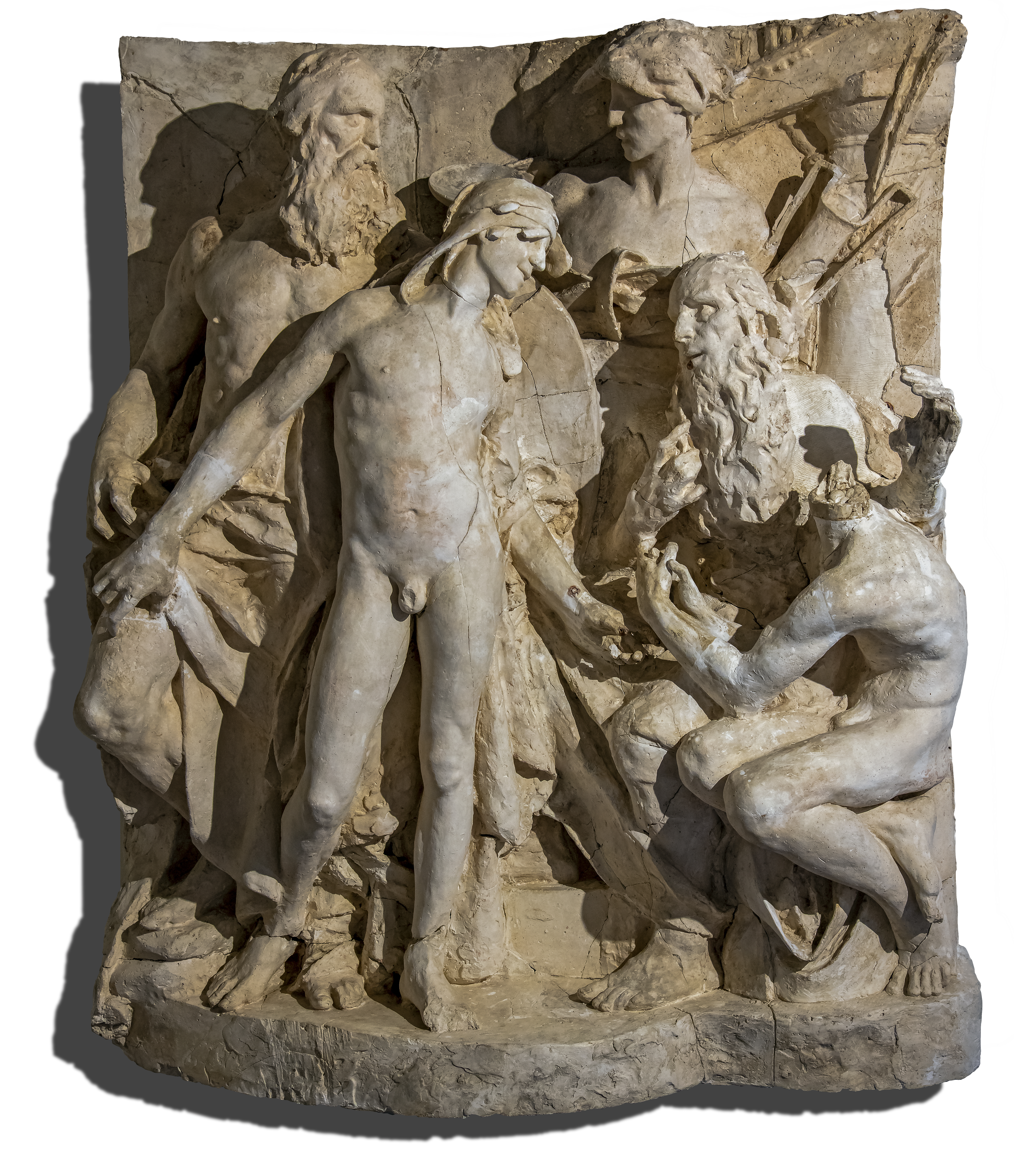 Scène mythologique (Télémaque, Nestor, Trasymède, Mentor, Athéna); Depicted person: Telemachus – mythological son of Odysseus